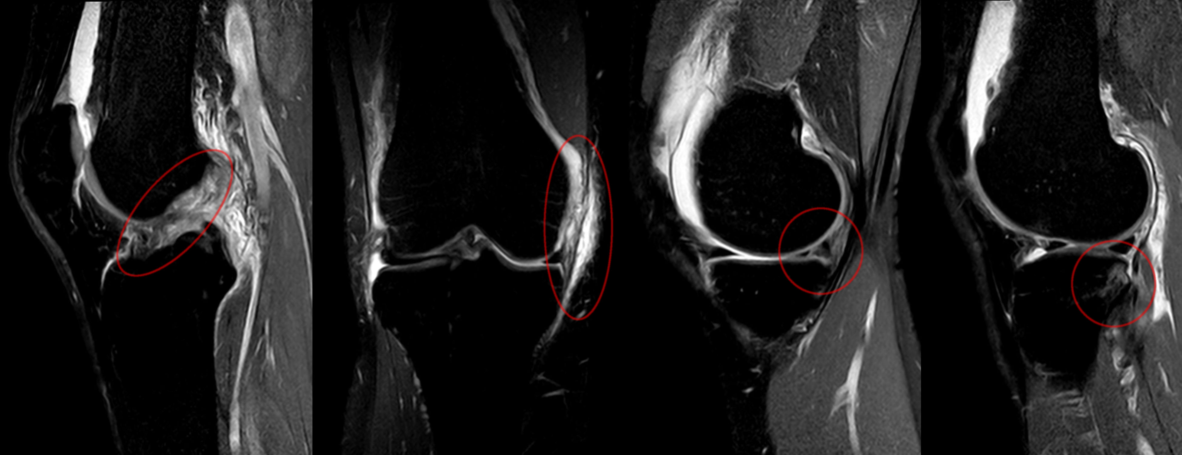 Unhappy triad Verletzung (nach O'Donoghue) des Kniegelenks im MRT (PDW SPIR). Von links nach rechts: Ruptur des vorderen Kreuzbandes Ruptur des medialen Kollateralbandes Innenmeniskusriss (hier komplexer Riss des Hinterhorns) Meist wie auch hier findet sich noch eine Kontusion / "bone bruise" dorsal im lateralen Tibiaplateau (ganz rechts).